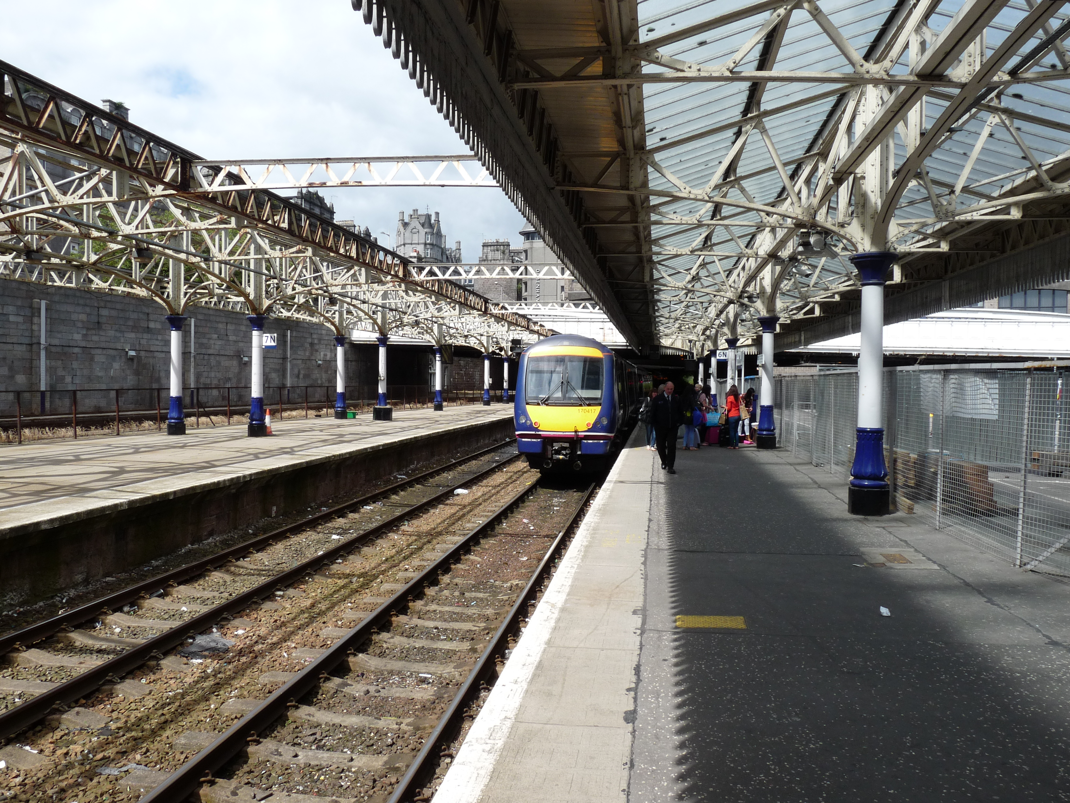 De trein uit Inverness is aangekomen